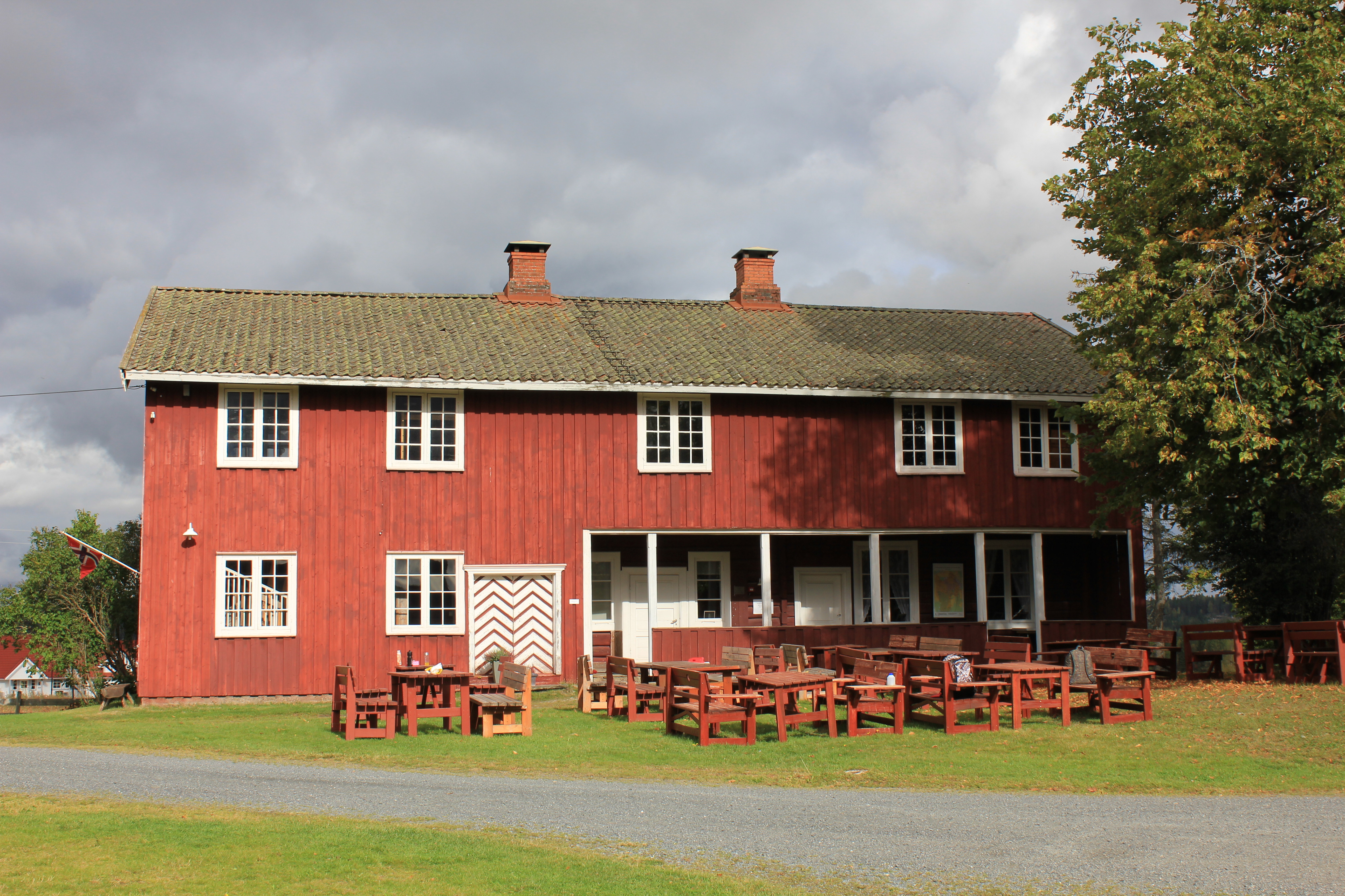 Aur prestegård ligger i Aurskog-Høland kommune i Akershus. Aur prestegård og Aurskog kirke ligger på et høydedrag sentralt i tettstedet Aurskog i den nordlige delen av kommunen. Her har kirke og prestegård ligget helt siden middelalderen. De nåværende bygningene på gården er fra 1700-tallet og fremover. Tre av husene er formelt fredet i henhold til §15 i "Lov om kulturminner".